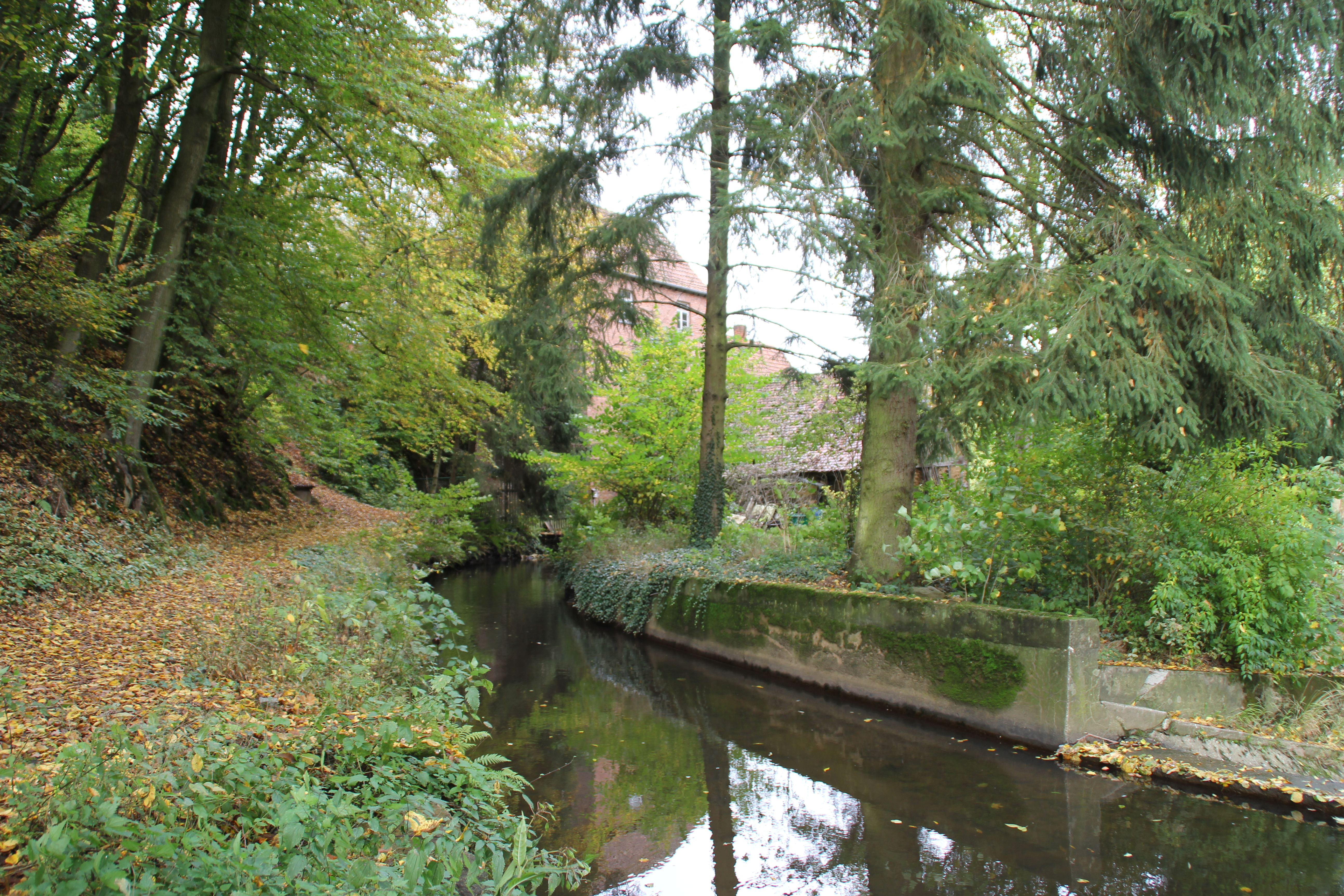 Die Kahl an der Hellenthalsmühle im Jahr 2019